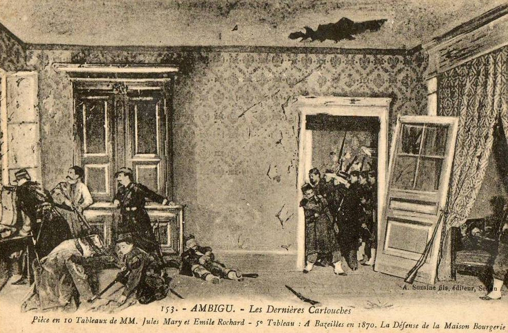 Carte postale représentant un tableau de la pièce de théâtre Les Dernières Cartouches, d'après Jules Mary (1902) , adaptée par Émile Rochard et créée au Théâtre de l'Ambigu, le 8 février 1903.